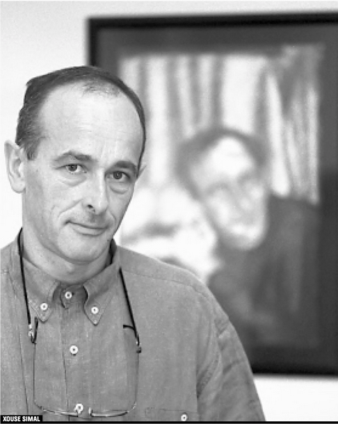 Andolin Eguskitza santurtziar euskaltzaina 2001ean.